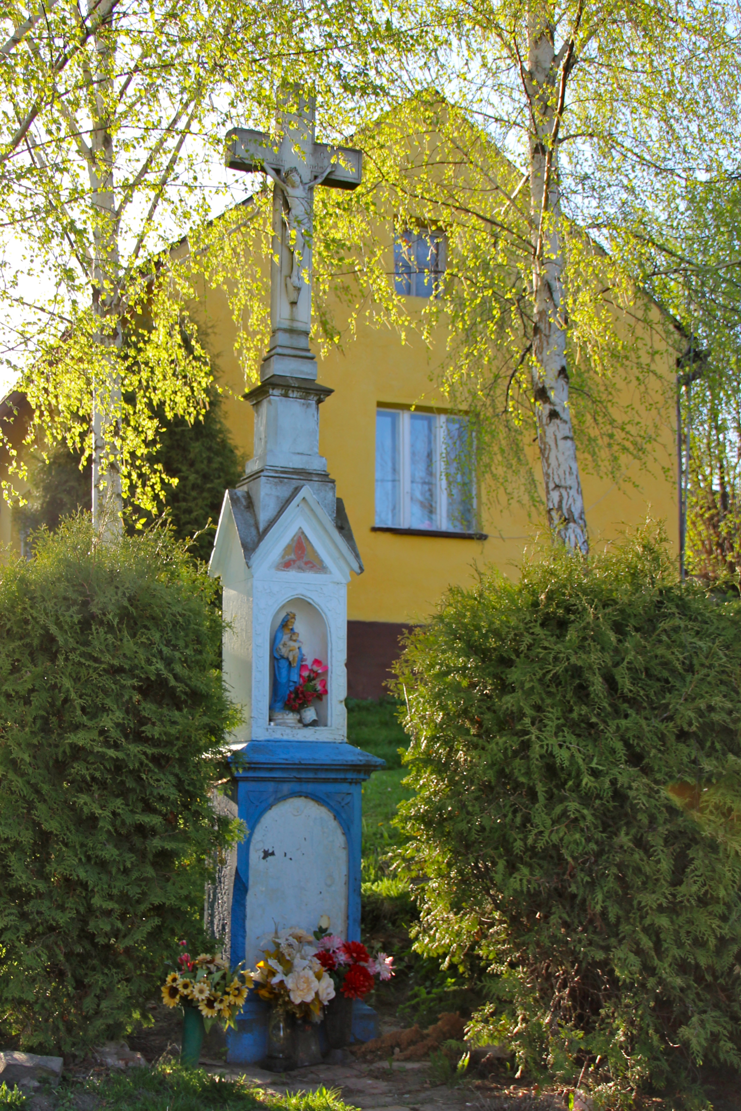 Ciermięcice (dawniej też Ciermęcice) – wieś w Polsce położona w województwie opolskim, w powiecie głubczyckim, w gminie Głubczyce.